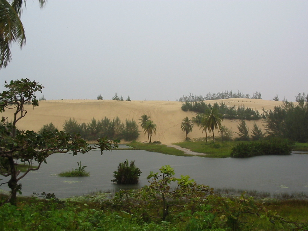 Barra do Cauipe em dia de chuva